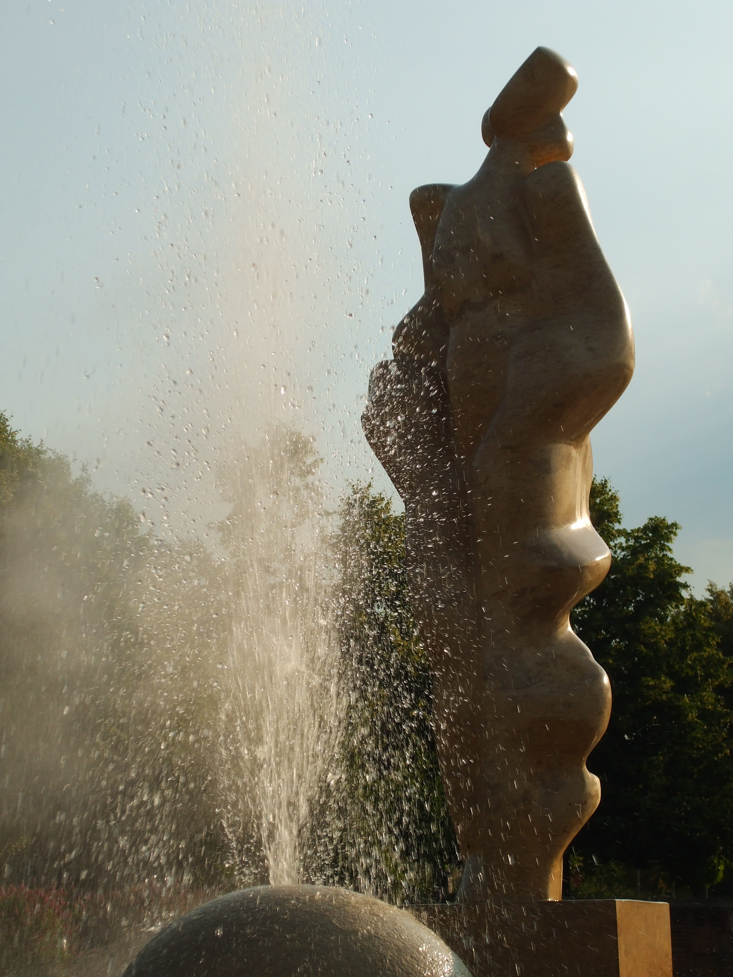 Гейзерът в Сапарева баня; скулптор Вълко Ценов